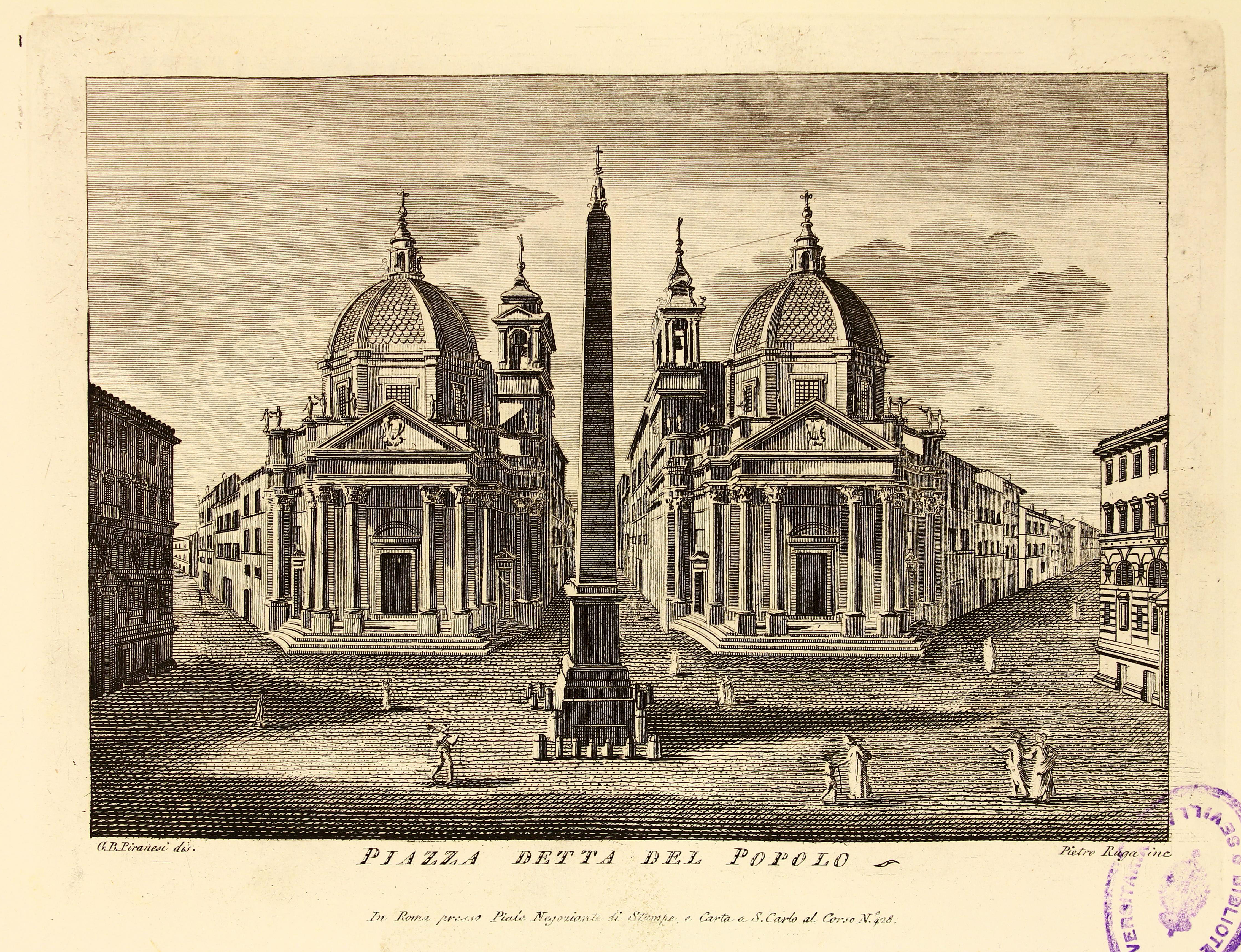 Autor: Venuti, Ridolfino, 1705-1763 Descripción bibliográfica: Accurata e succinta descrizione topografica delle antichita di Roma / Ridolfino Venuti Cortonese. - 3ª ed. - Roma: [s.n.], 1824 (presso Pietro Piale e Mariano de Romanis). - v. ; 26 cm. - T. 1 -- T. 2. - Contiene grab. por todo el texto Materia: Ciudades antiguas Materia: Roma - Descripciones Materia: Roma - Historia Localización: Libro completo